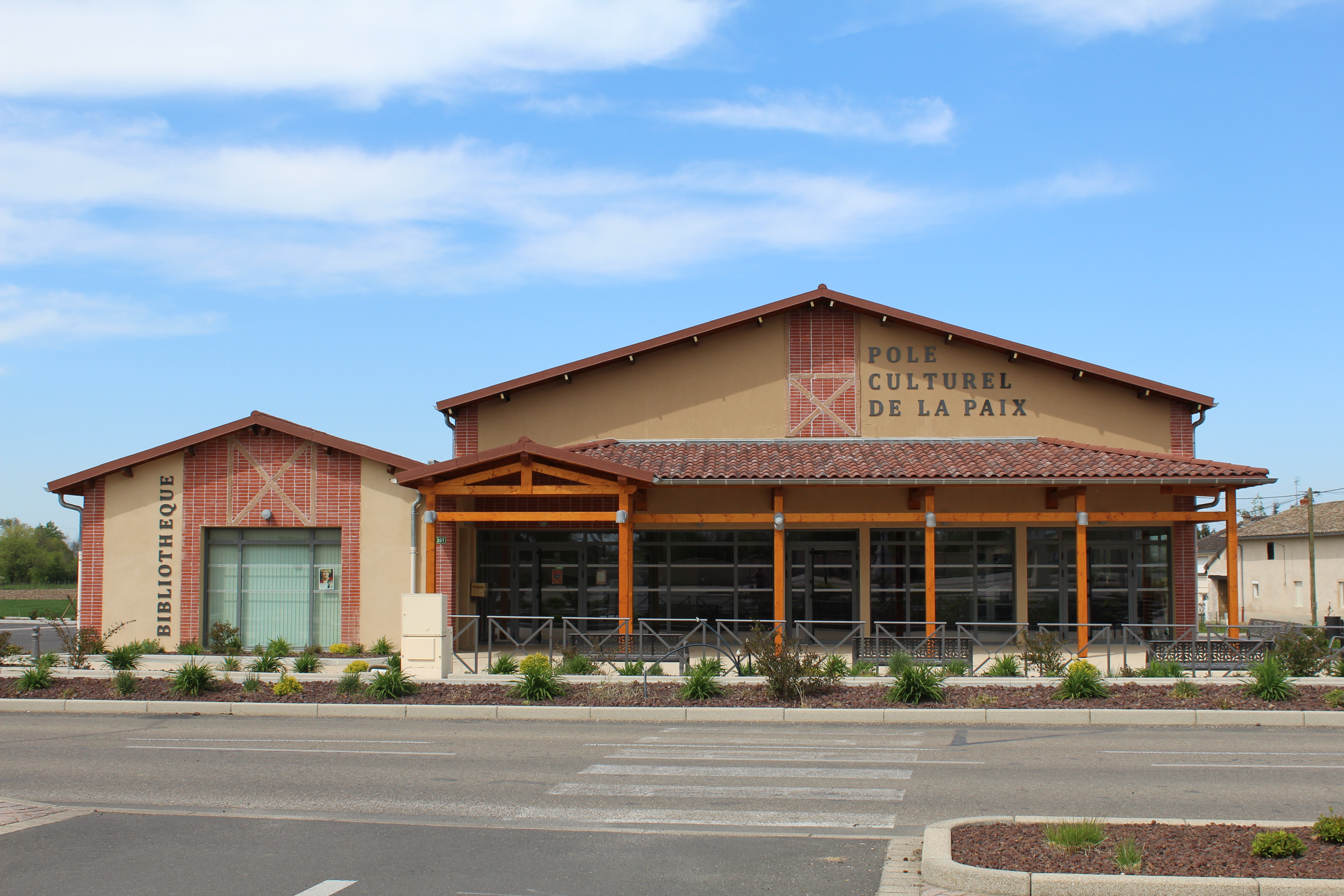 Pôle culturel de la paix situé à Replonges